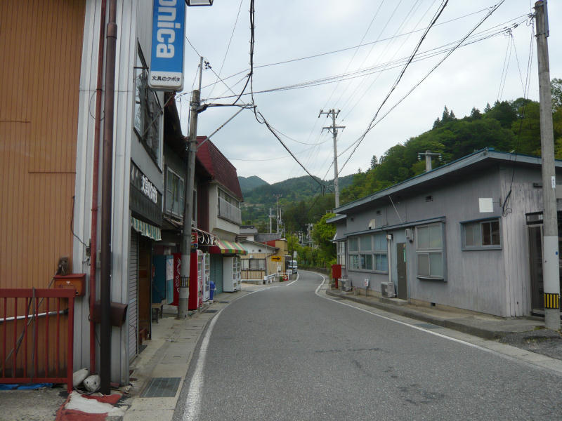 飯田線温田駅前